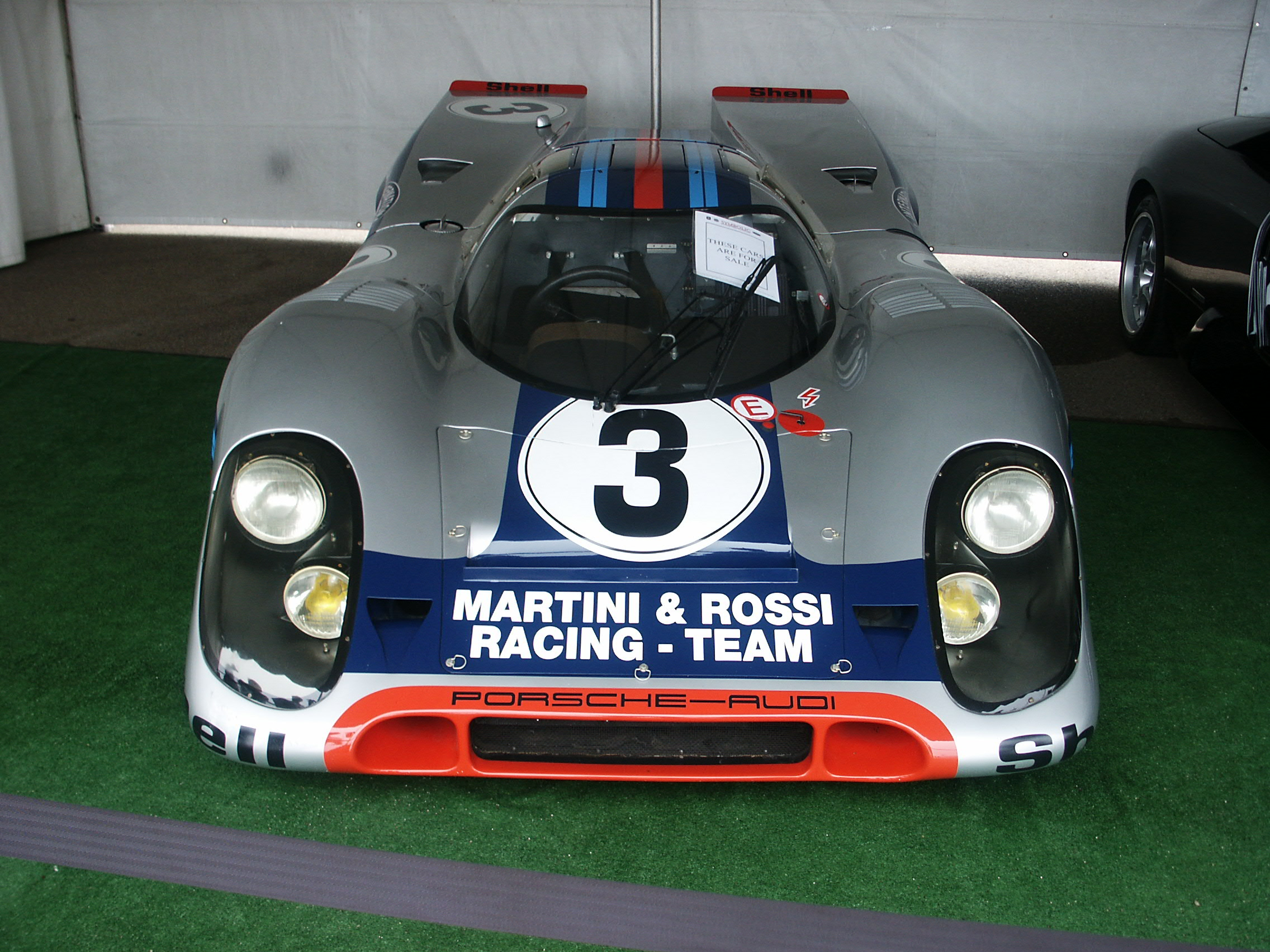 Porsche 917